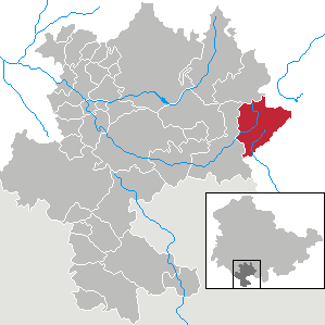 Sachsenbrunn in Thuringia - district Hildburghausen